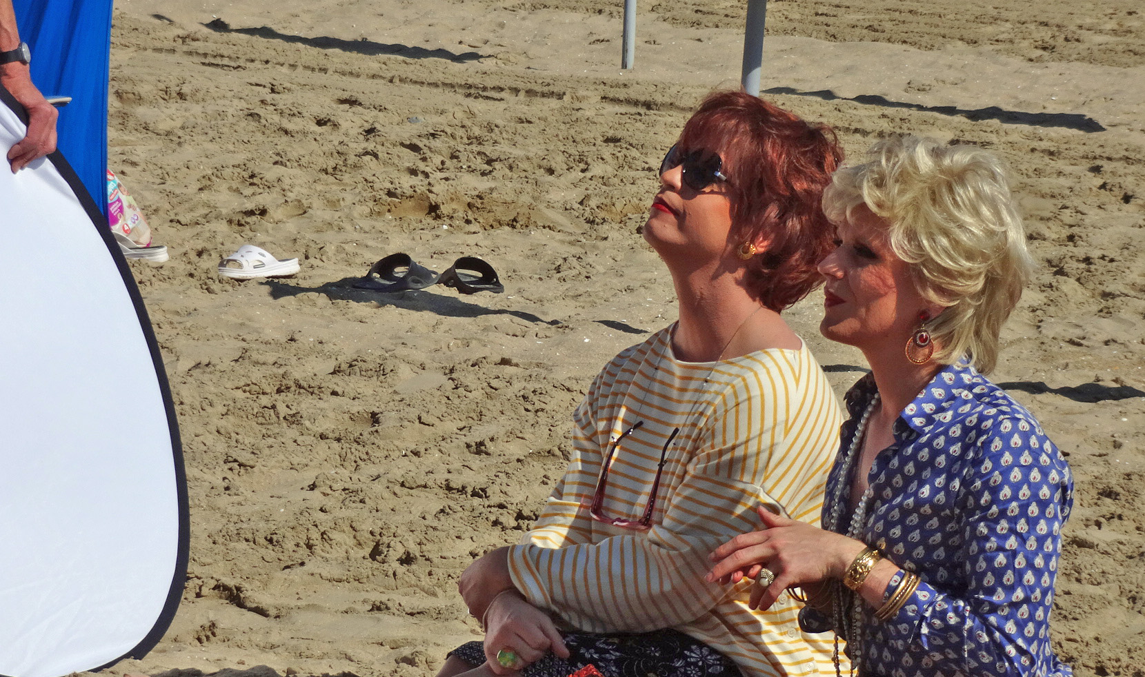 Catherine et Liliane : enregistrement d'un sketch sur la plage de Deauville.